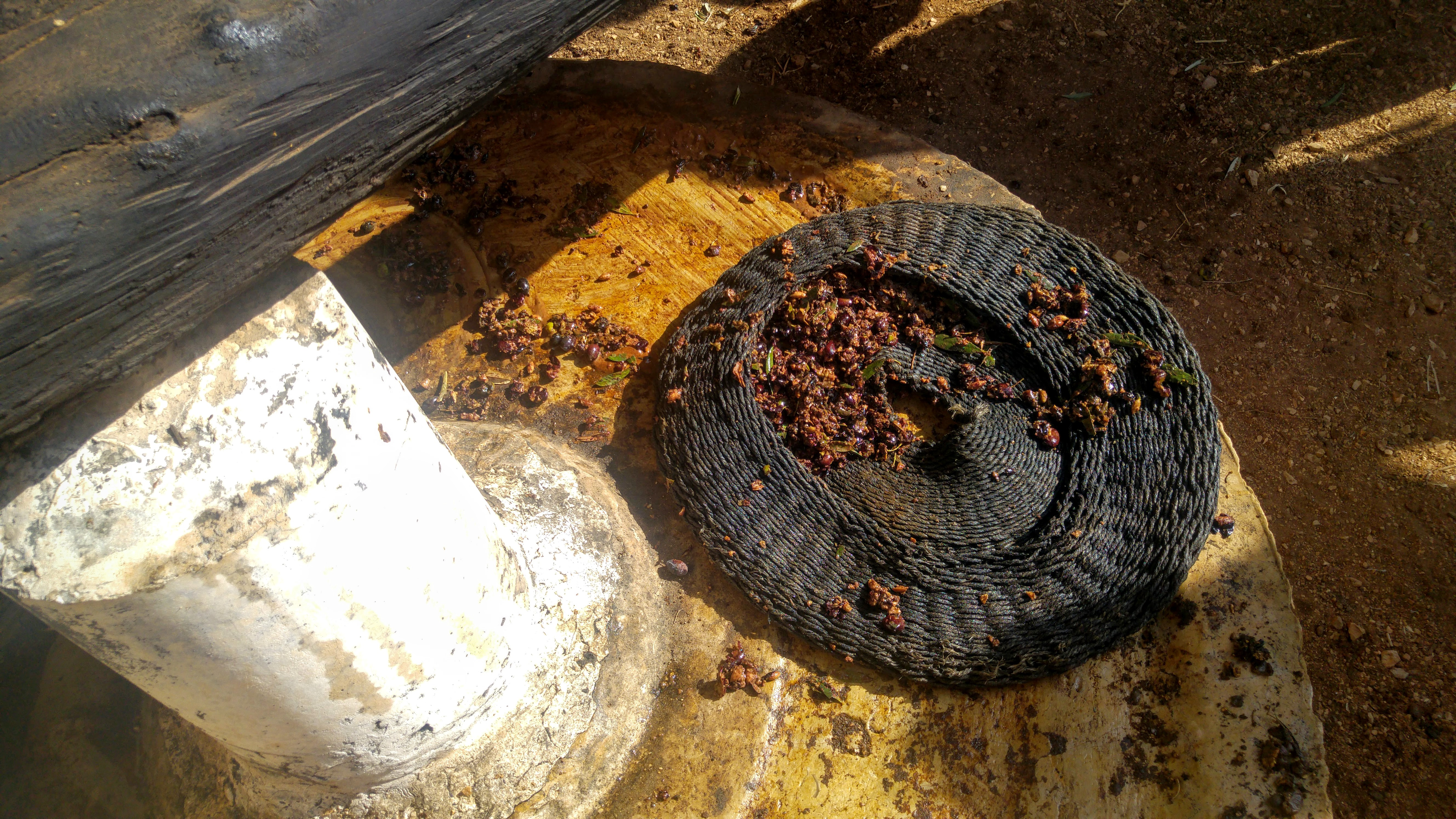 הפקת שמן זית בשיטות מסורתיות_כפר קדם